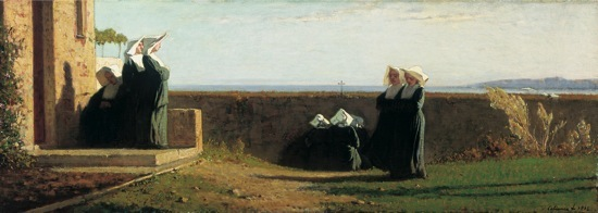 Le monachine